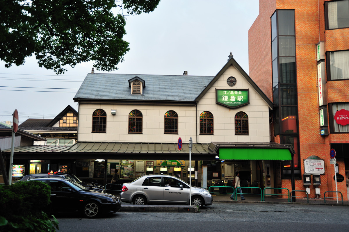 江之島電鐵 鎌倉車站